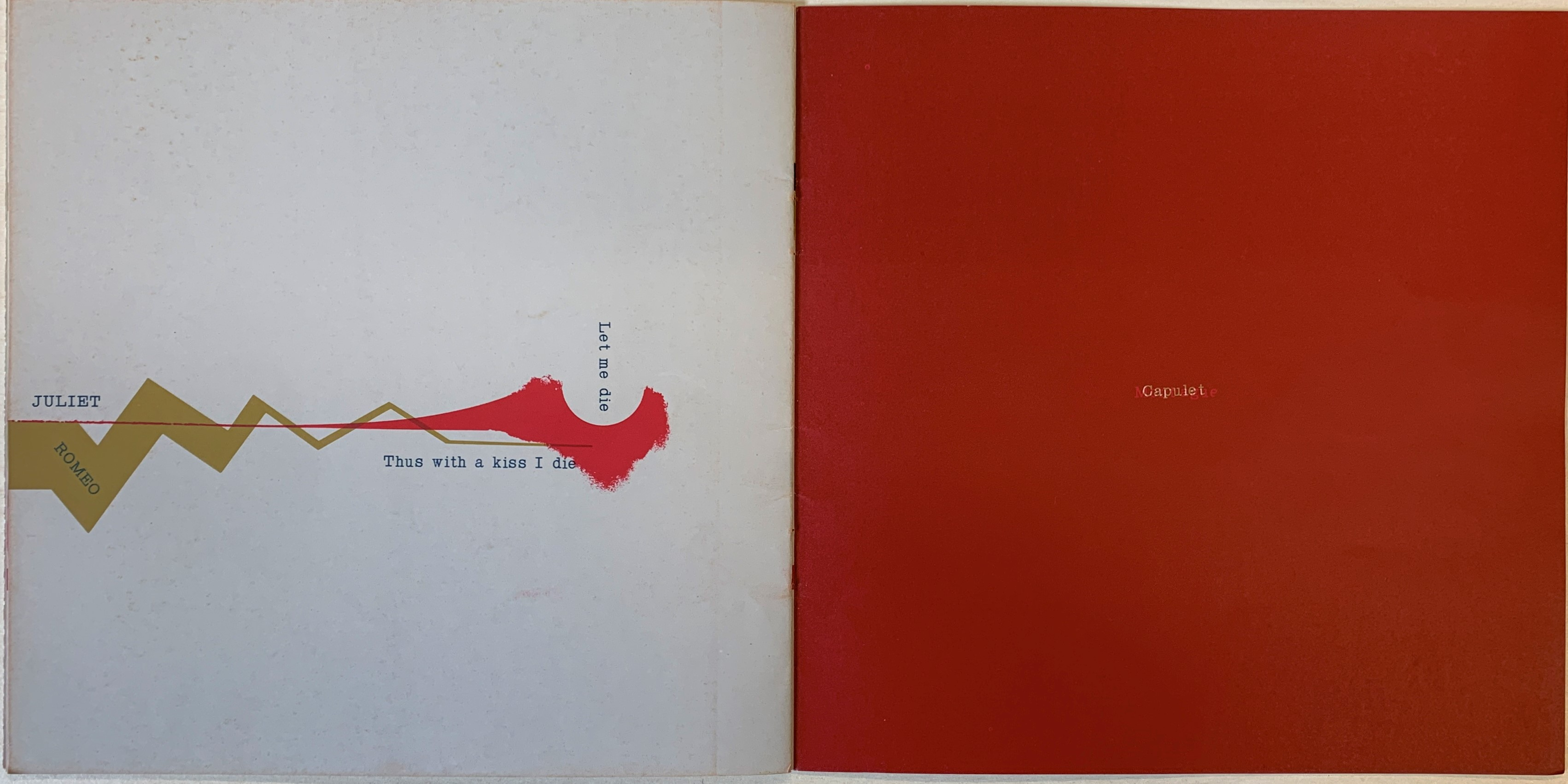 Pagina del libro Romeo and Juliet di Shigeo Fukuda